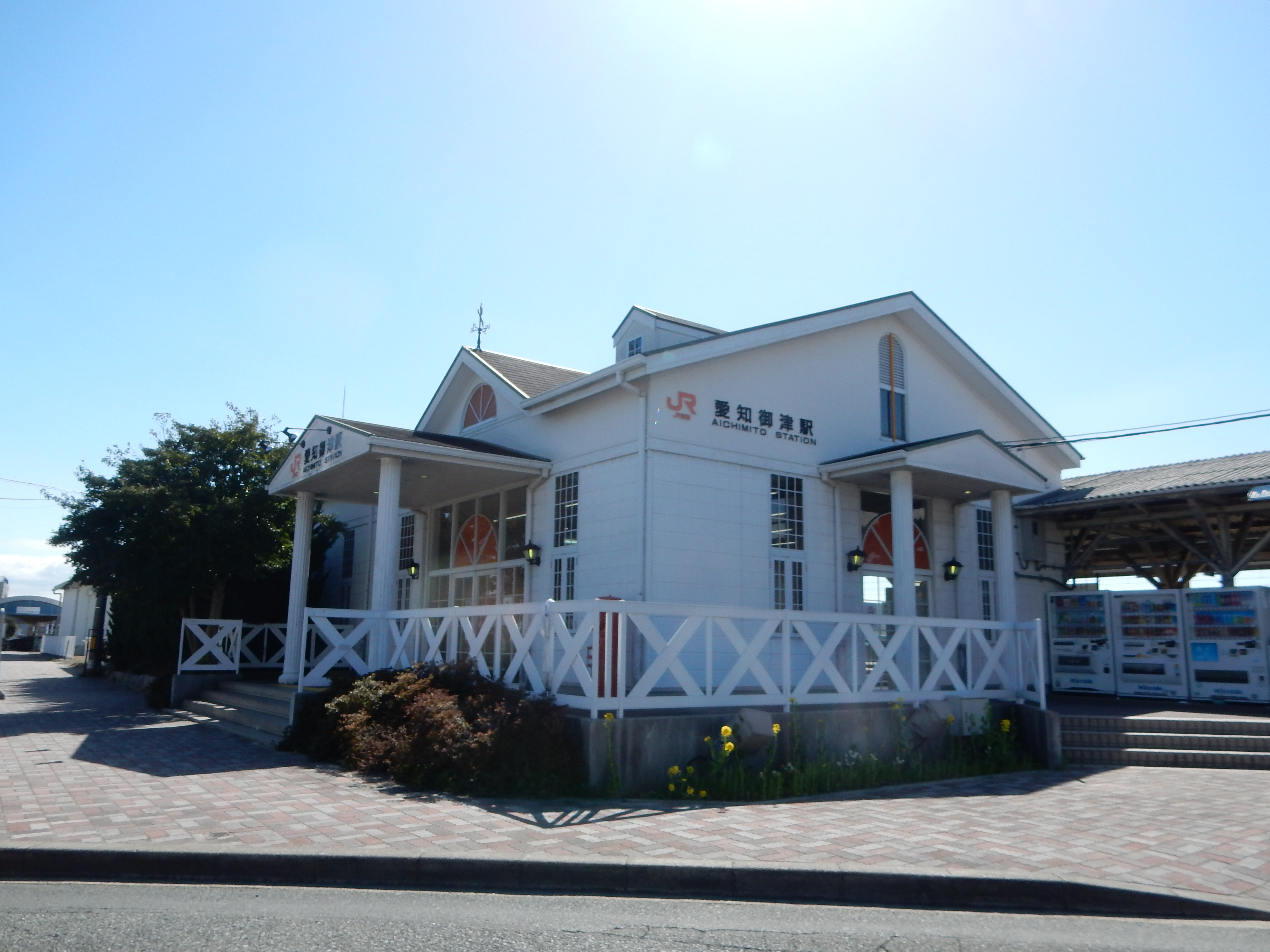 愛知御津駅 Nikon Coolpix S9900